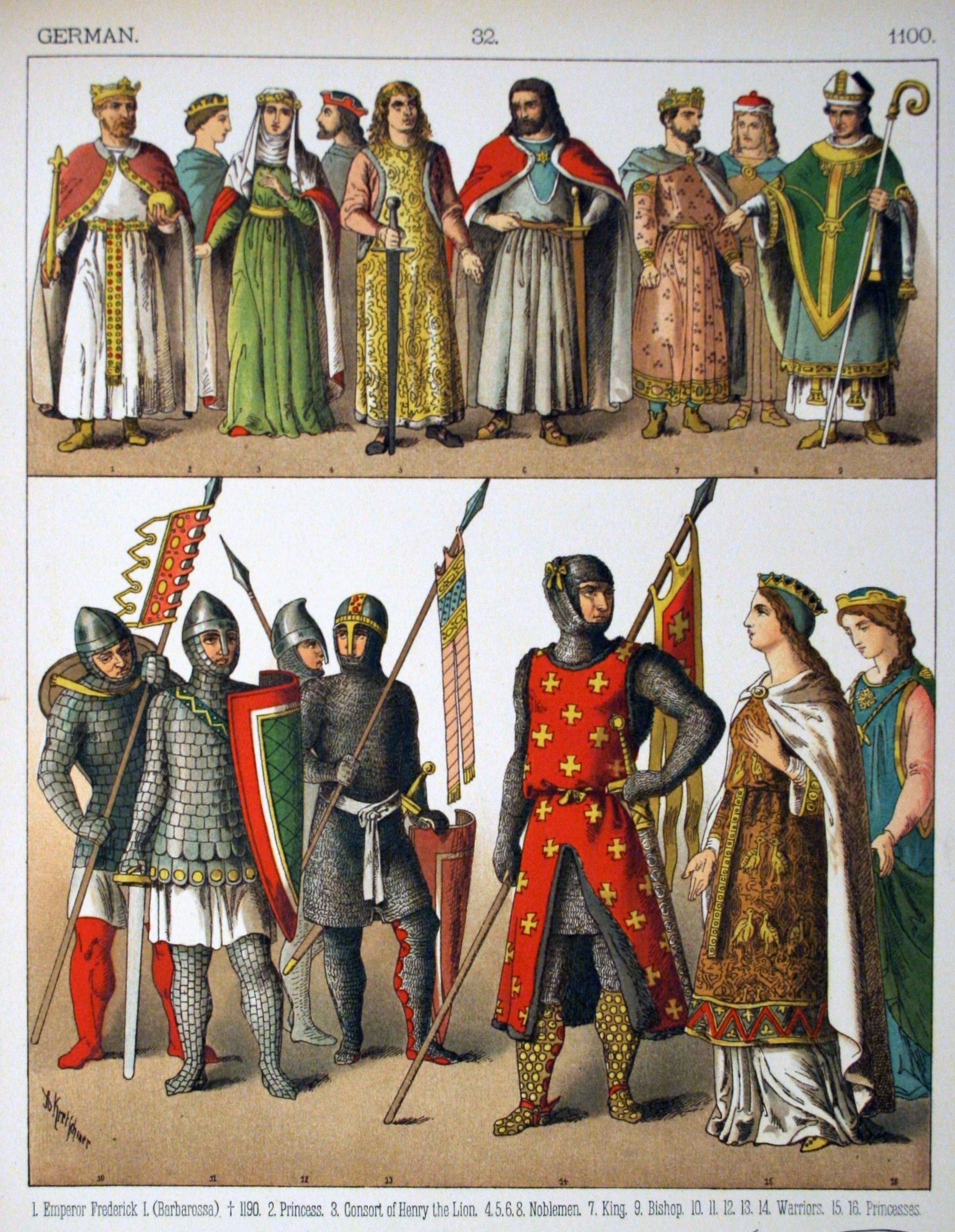 1100, German